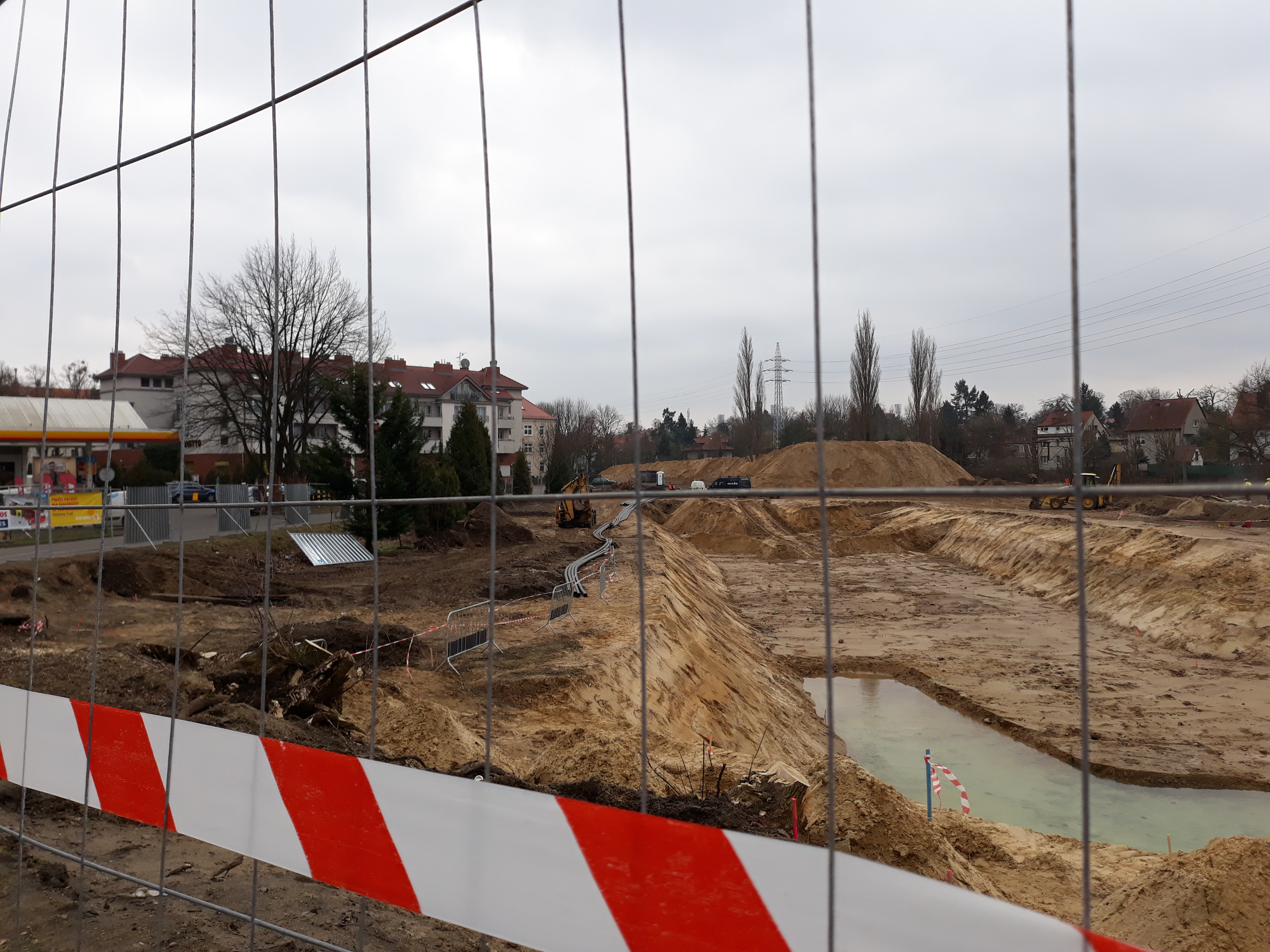 Budowa węzła Szczecin-Łękno